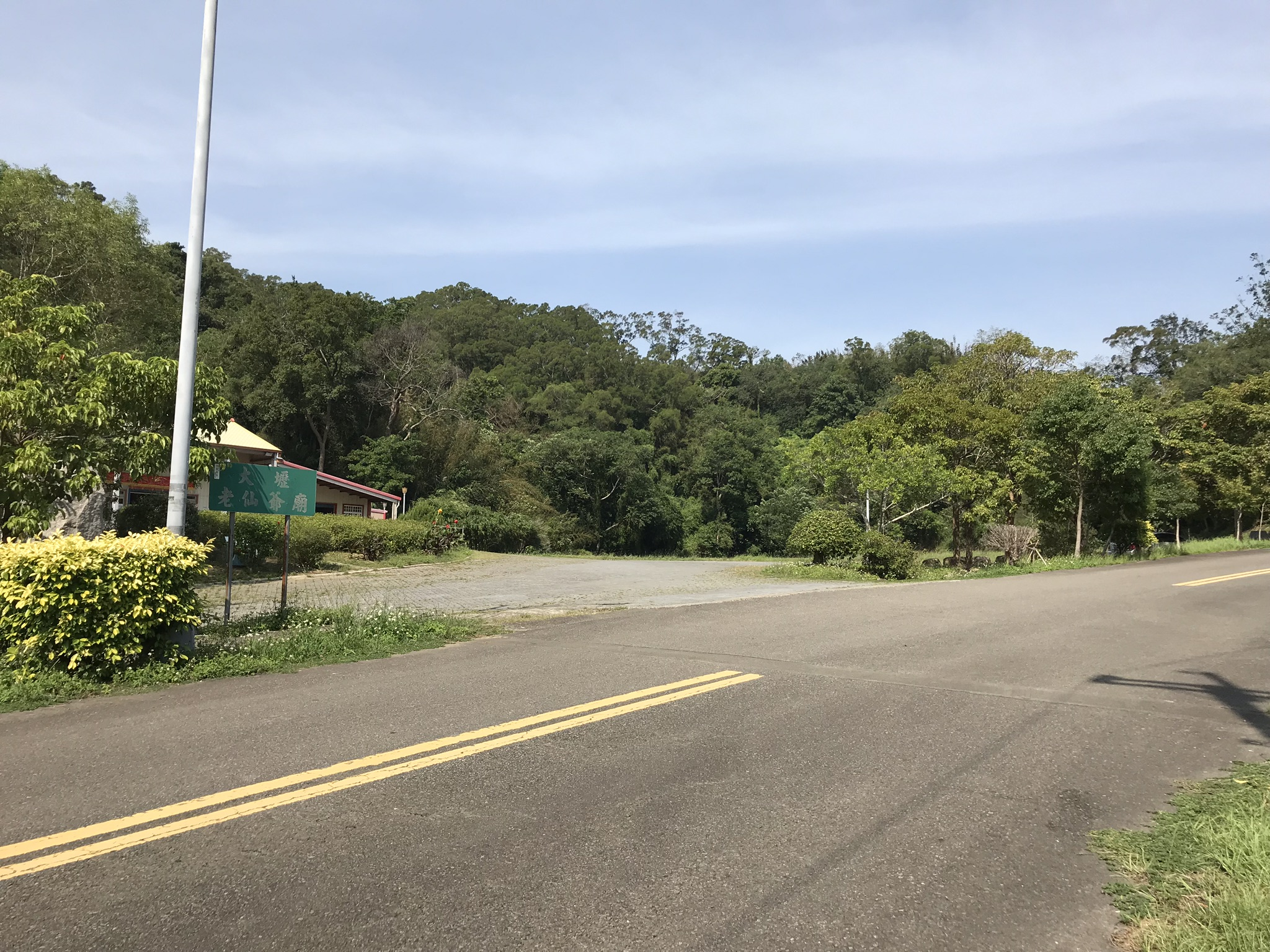 中文（台灣）: 大壢老仙爺廟入口